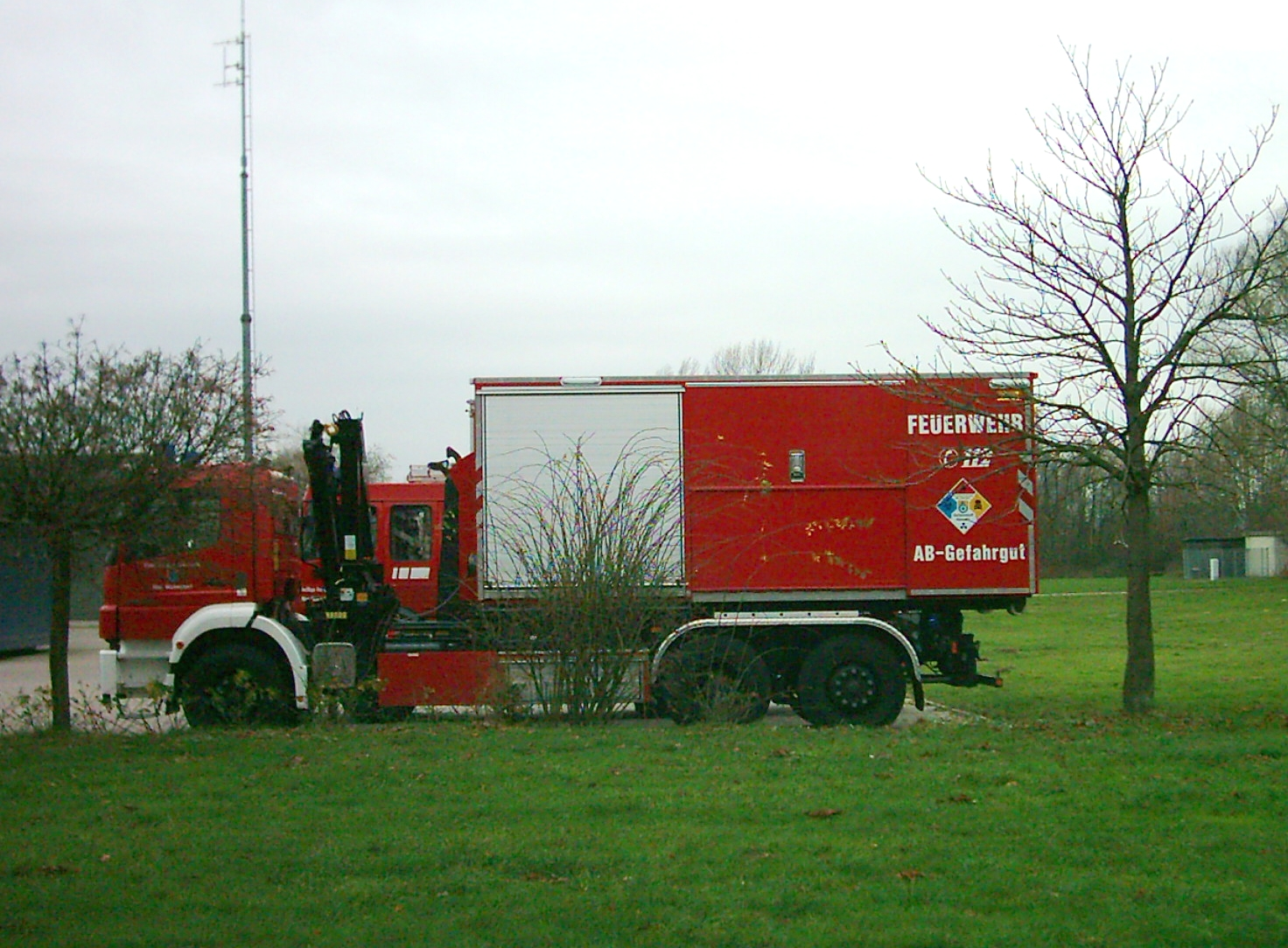 AB Gefahrgut der Freiwilligen Feuerwehr Neu Wulmstorf.